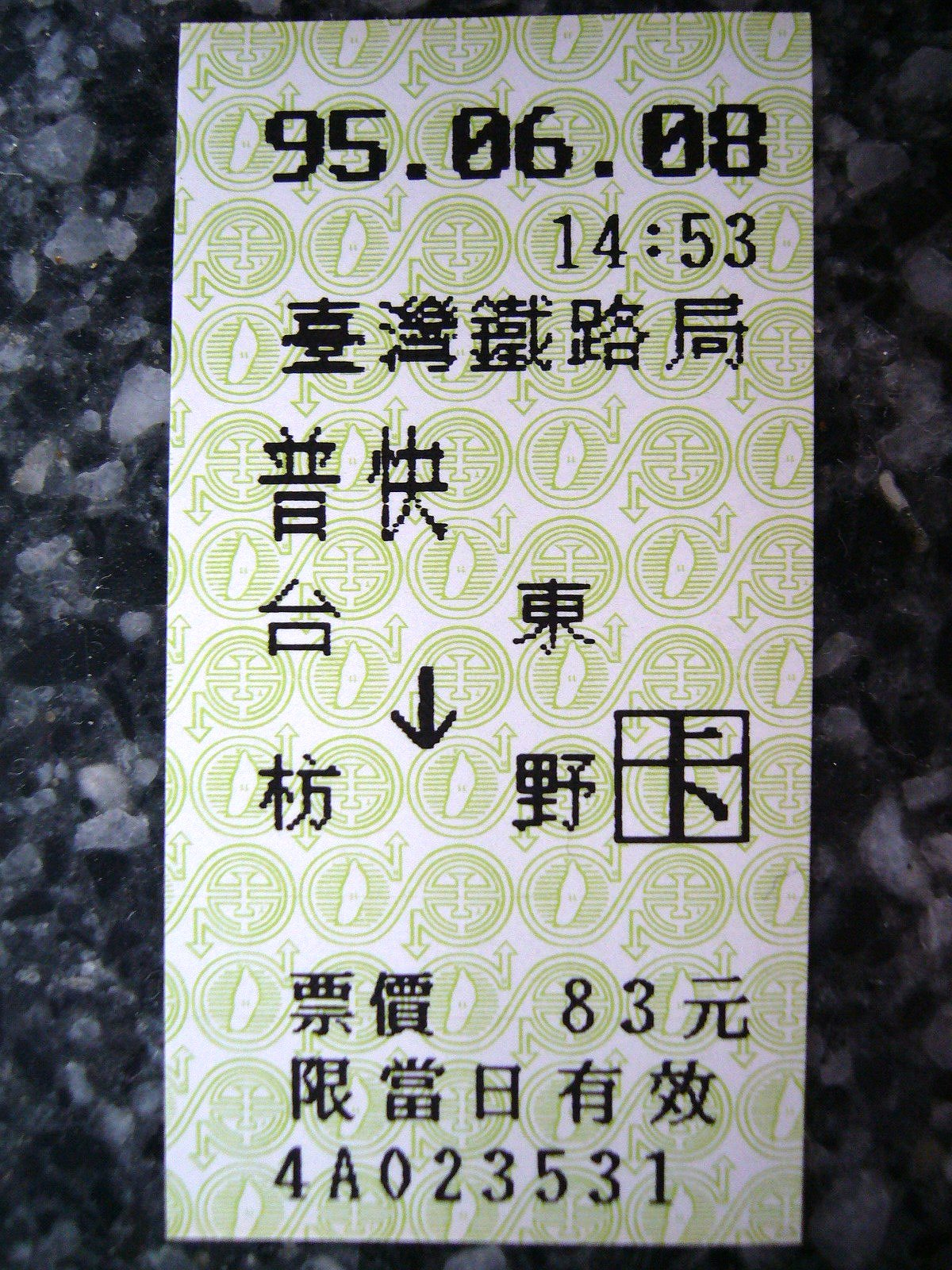 中文（台灣）: 2006年（中華民國95年）6月8日，臺灣鐵路管理局以熱感應紙印製的臺東往枋野普快車車票。